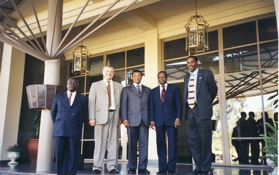 Pierrot rajaonarivelo en 2002